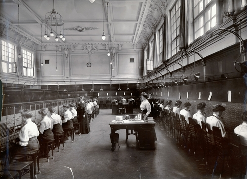 Główna sala centrali telefonicznej przy Zielnej 37 z 1904 r.